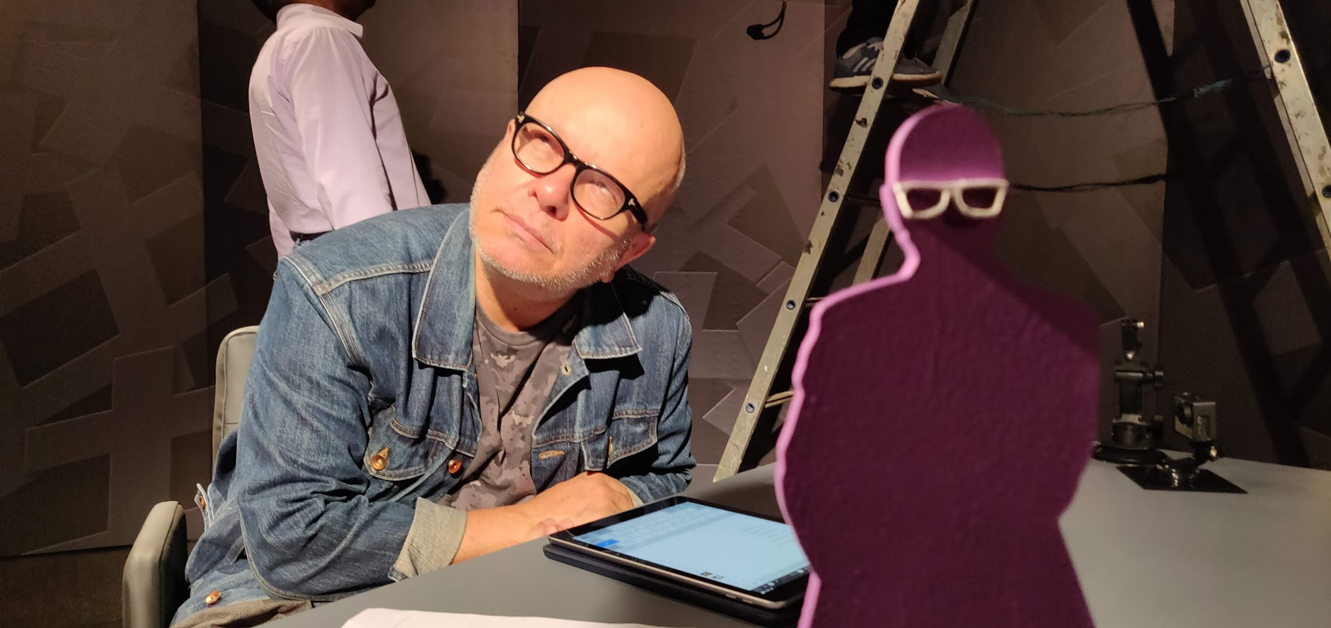 Marcelo Tas e seu boneco no cenário do Provocações